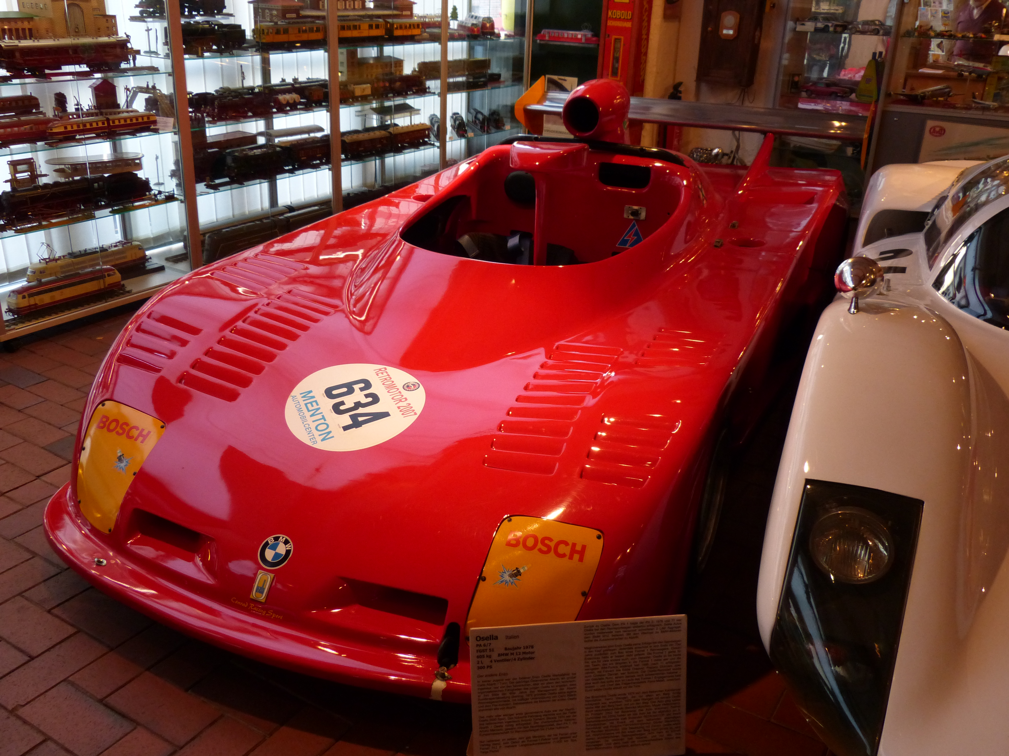 Auto- und Spielzeugmuseum Boxenstop Tübingen